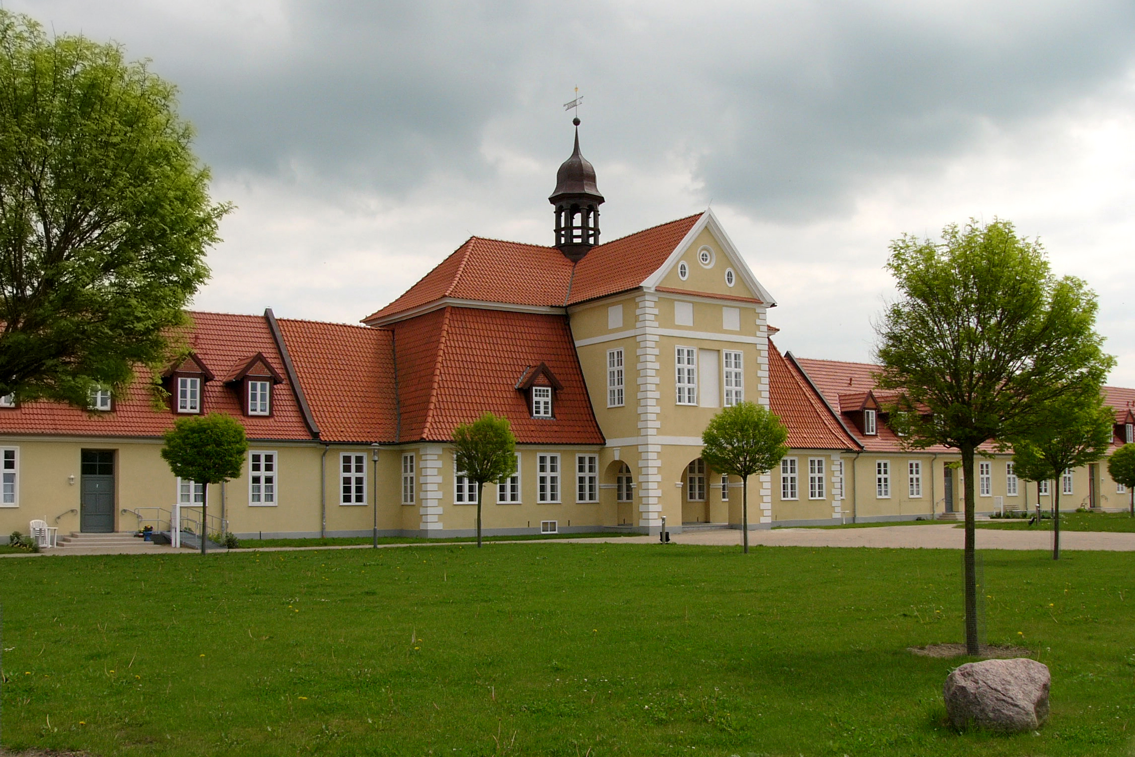 Adliges Fräuleinstift in Barth, Germany